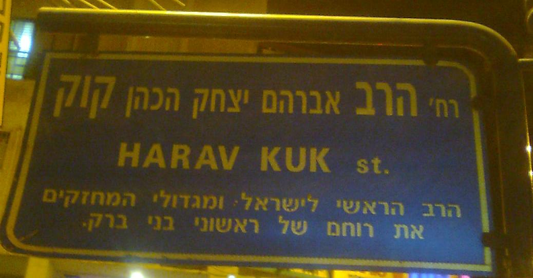 רחוב he:הרב קוק בhe:בני ברק